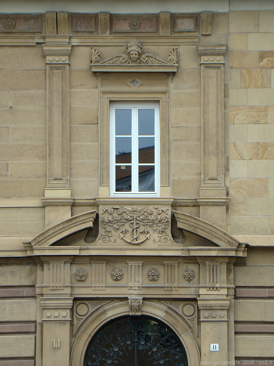 Villa Adelmann, Bahnhofstr. 11 in Heilbronn